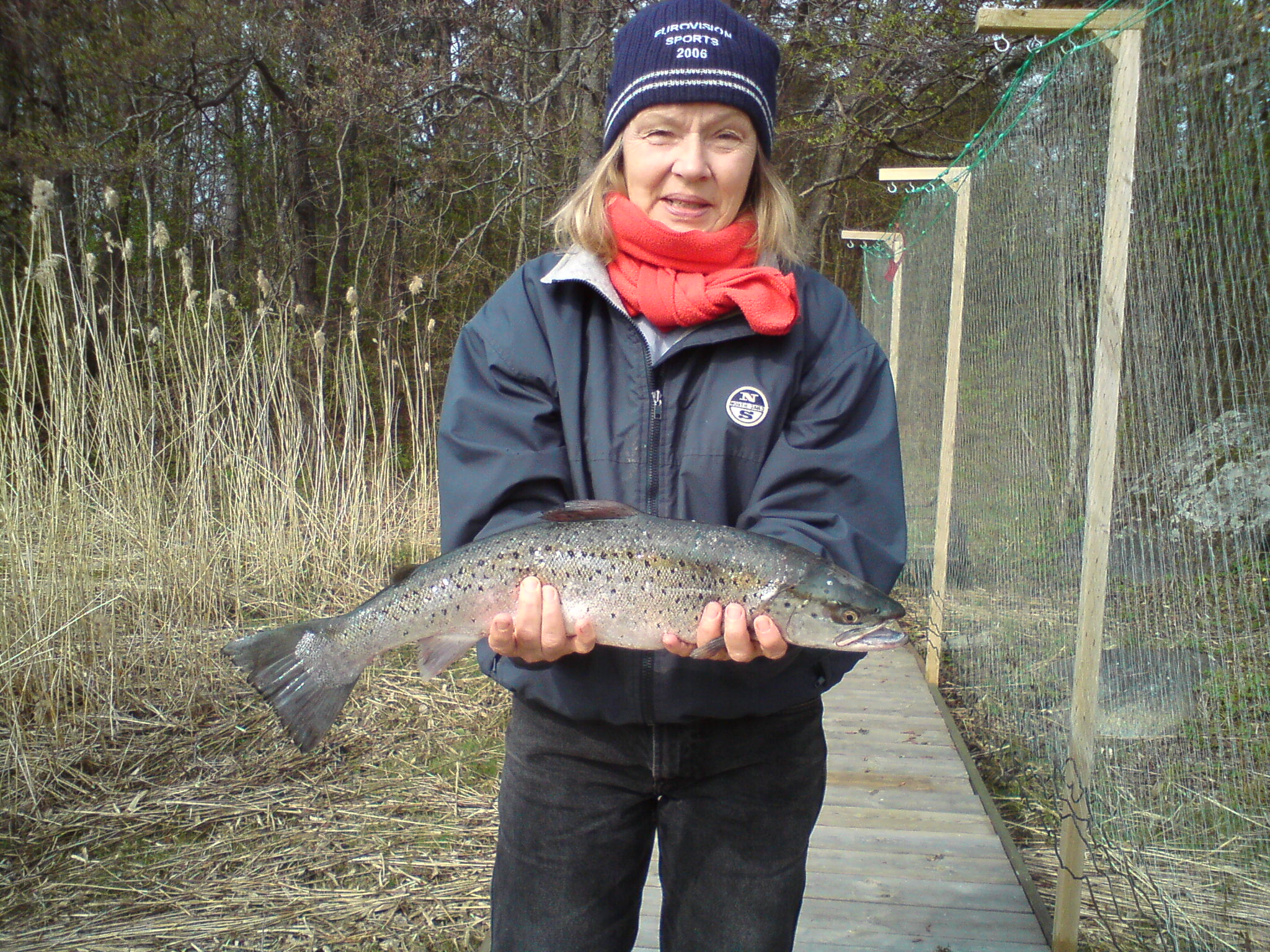 Astrid med havsöring, fångad maj -09